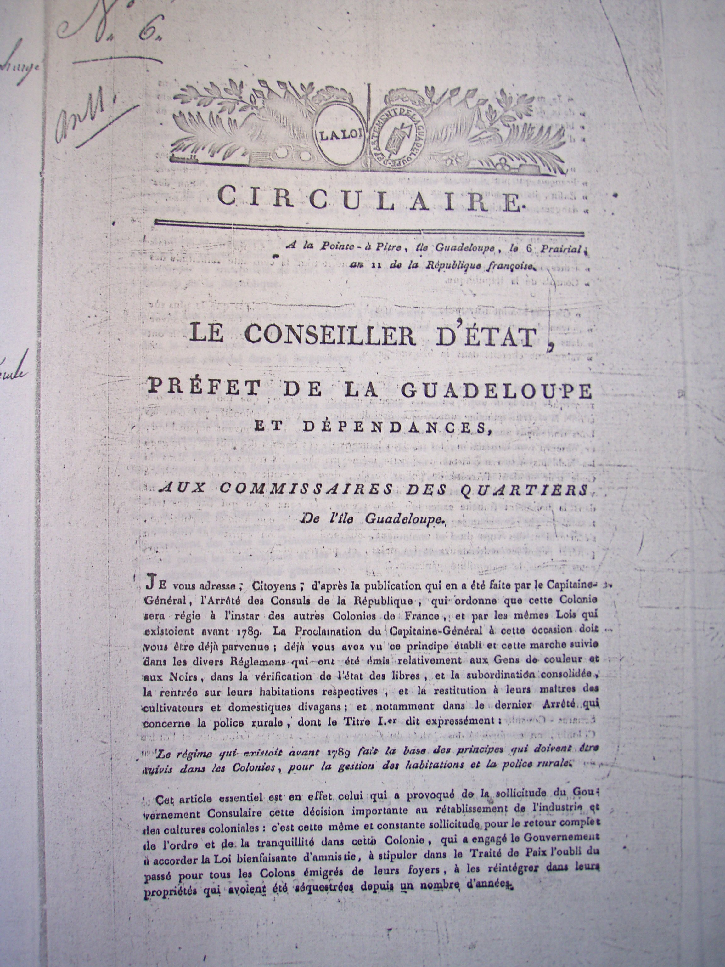 Arrêté consulaire de Bonaparte rétablissant l'esclavage à la Guadeloupe du 16 juillet 1802 : circulaire du préfet colonial de la Guadeloupe du 6 prairial an XI (26 mai 1803) diffusant la version imprimée localement du texte (ANOM, C7A 59 ; ADG 5J 60 et 1 Mi 8)